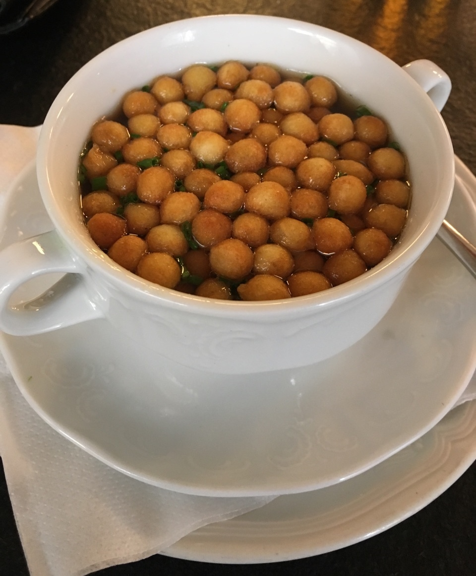 Backerbsensuppe, Waldviertler Hof, Wien 2017